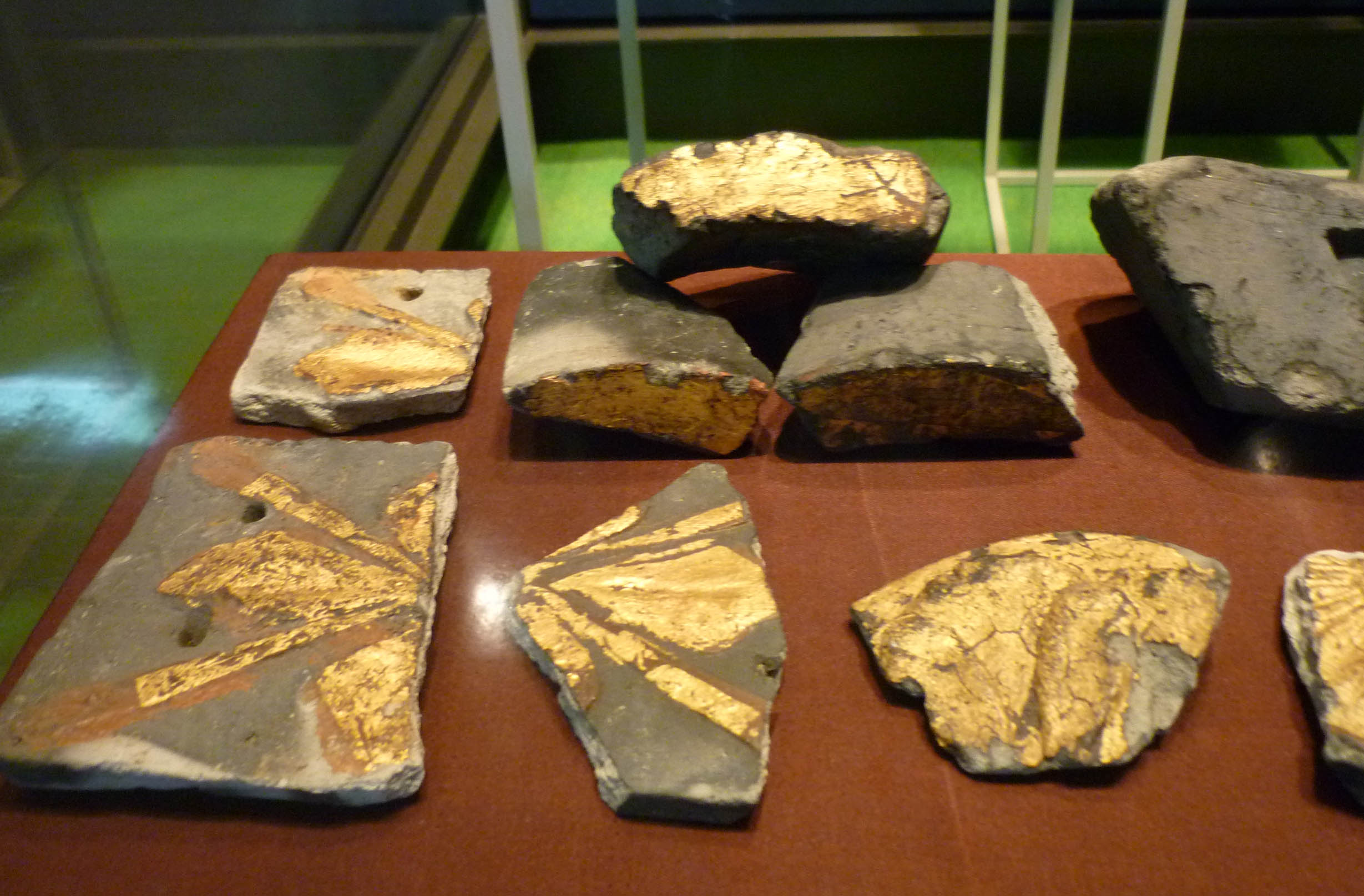 花菱文金箔道具瓦、他